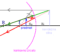 Konkavno zrcalo